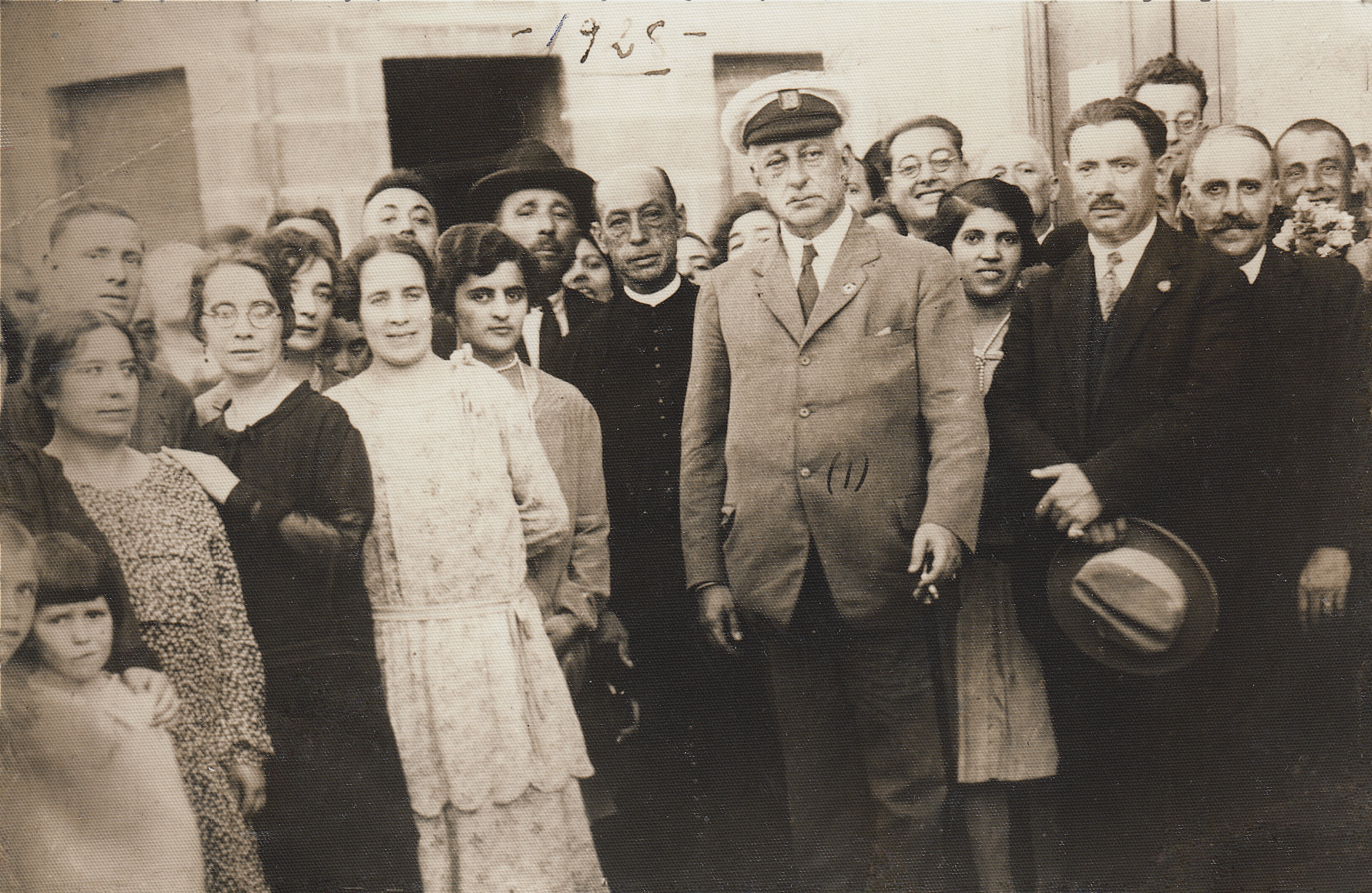 Visita do Xeral Miguel Primo de Rivera a Mondariz con Ramiro Vidal Carrera como Alcalde. 1928